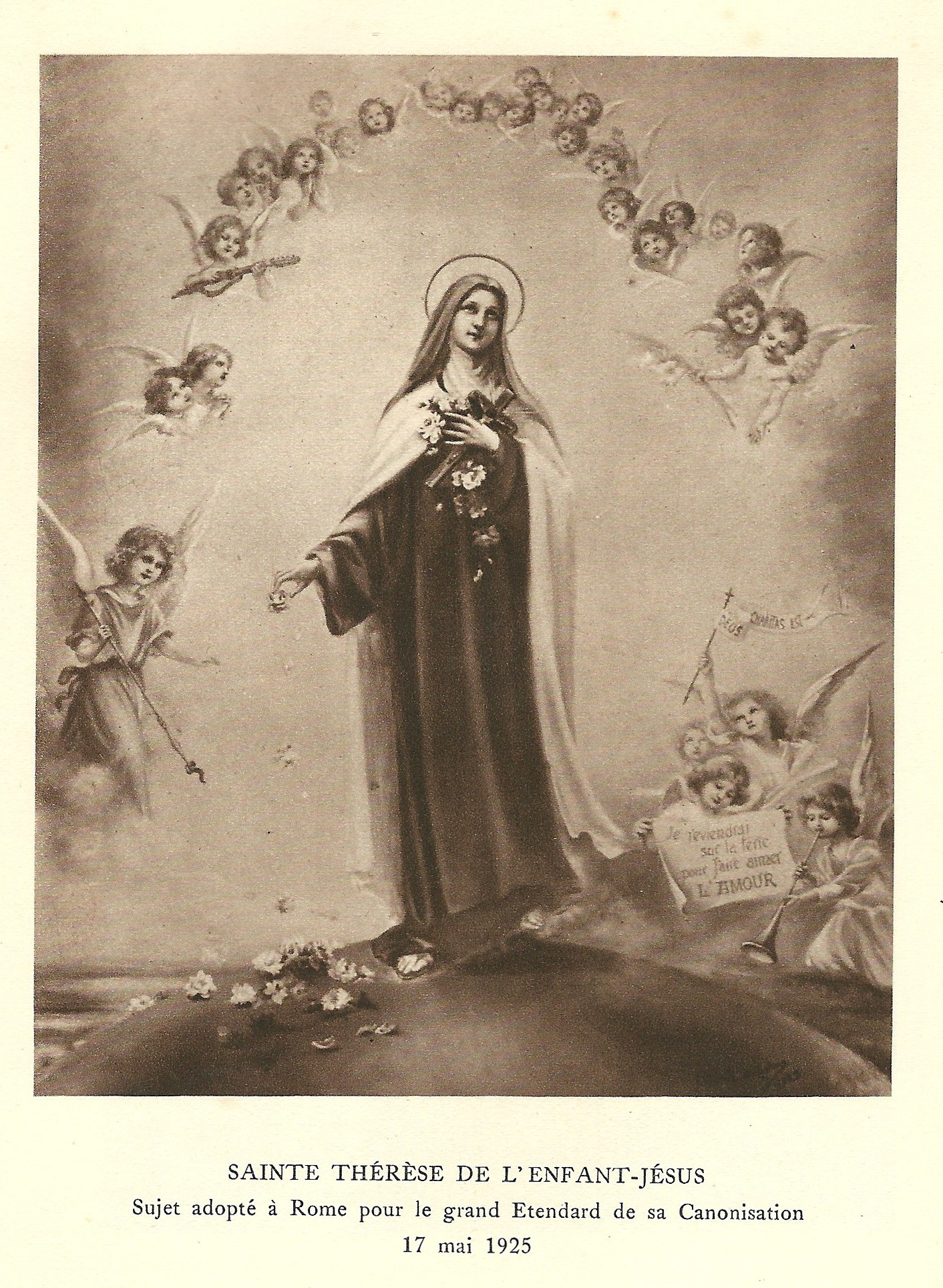 Gravure de "Sainte Thérèse de l'Enfant Jésus, Histoire d'une âme écrite par elle-même, Lisieux, Office central de Lisieux (Calvados), & Bar-le-Duc, Imprimerie Saint-Paul, 1937, édition 1940."